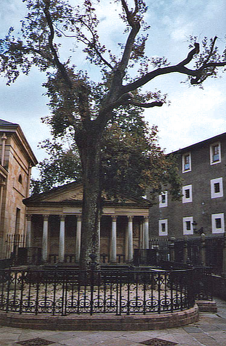 GernikakoArbola.jpg